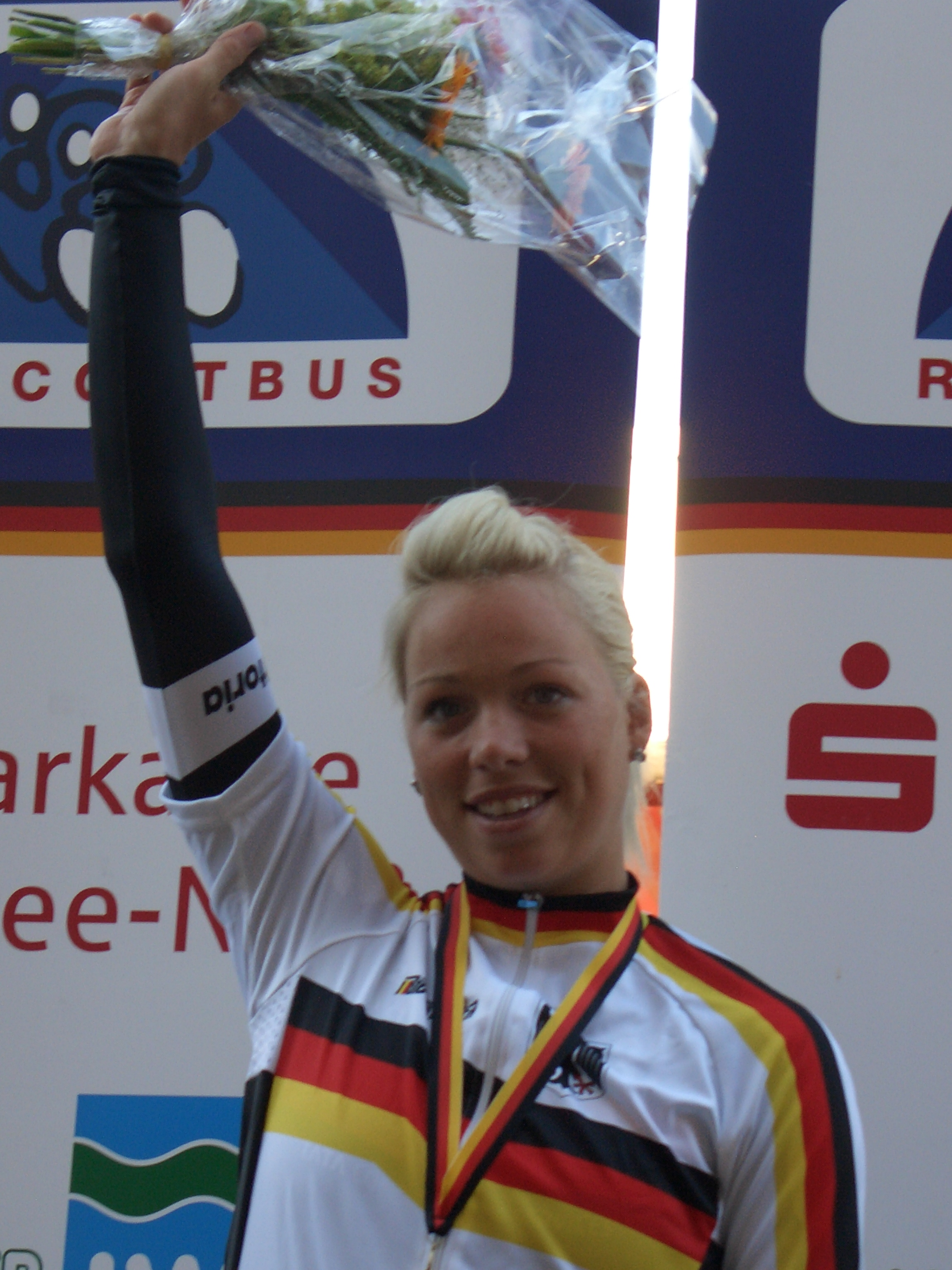 Charlotte Becker, Radsportlerin